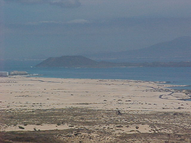 Dunas de Corralejo e Isla de Lobos desde Montaña Roja, Fuerteventura